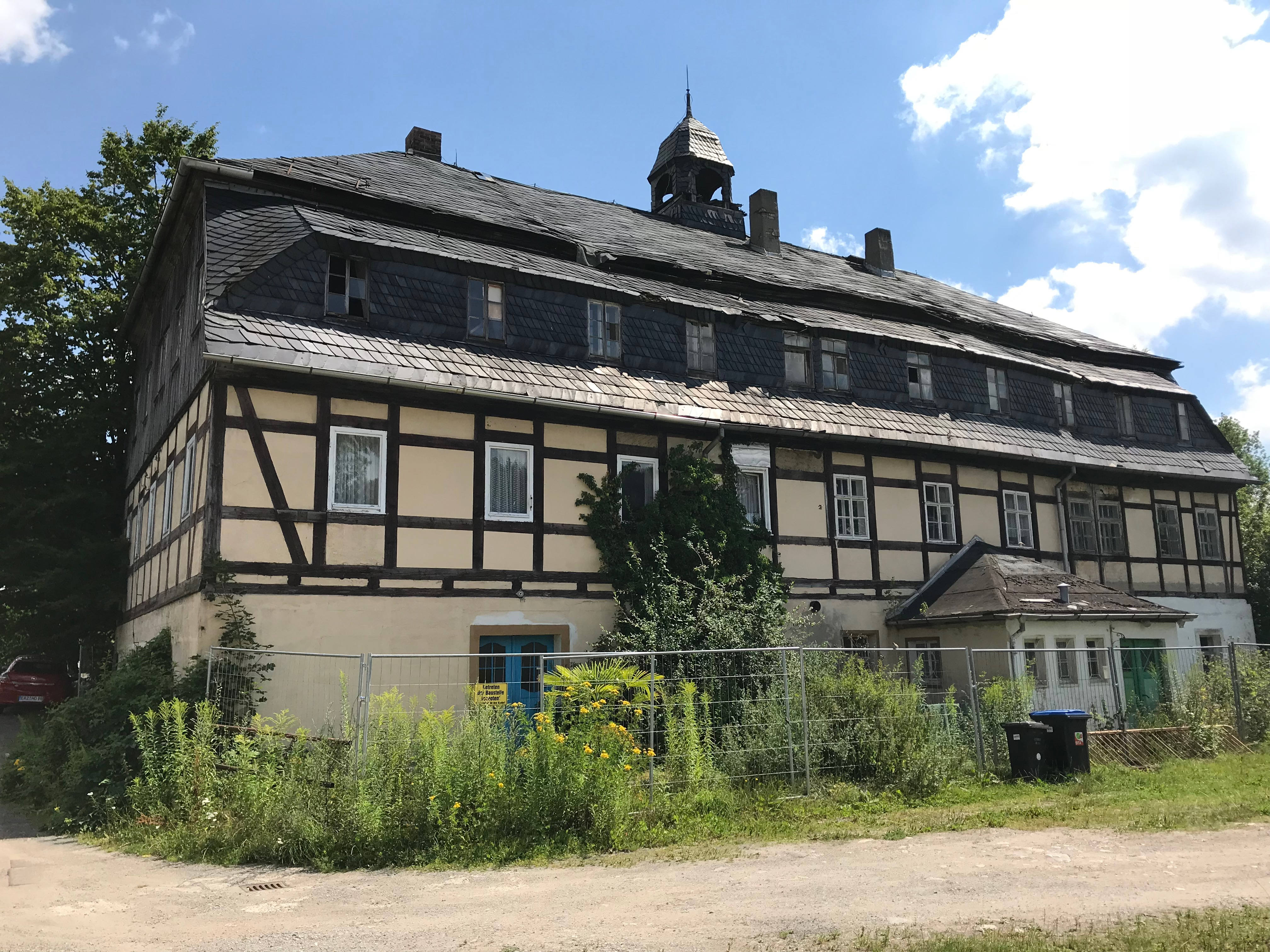 Mahl- und Schneidemühle Nenningsmühle